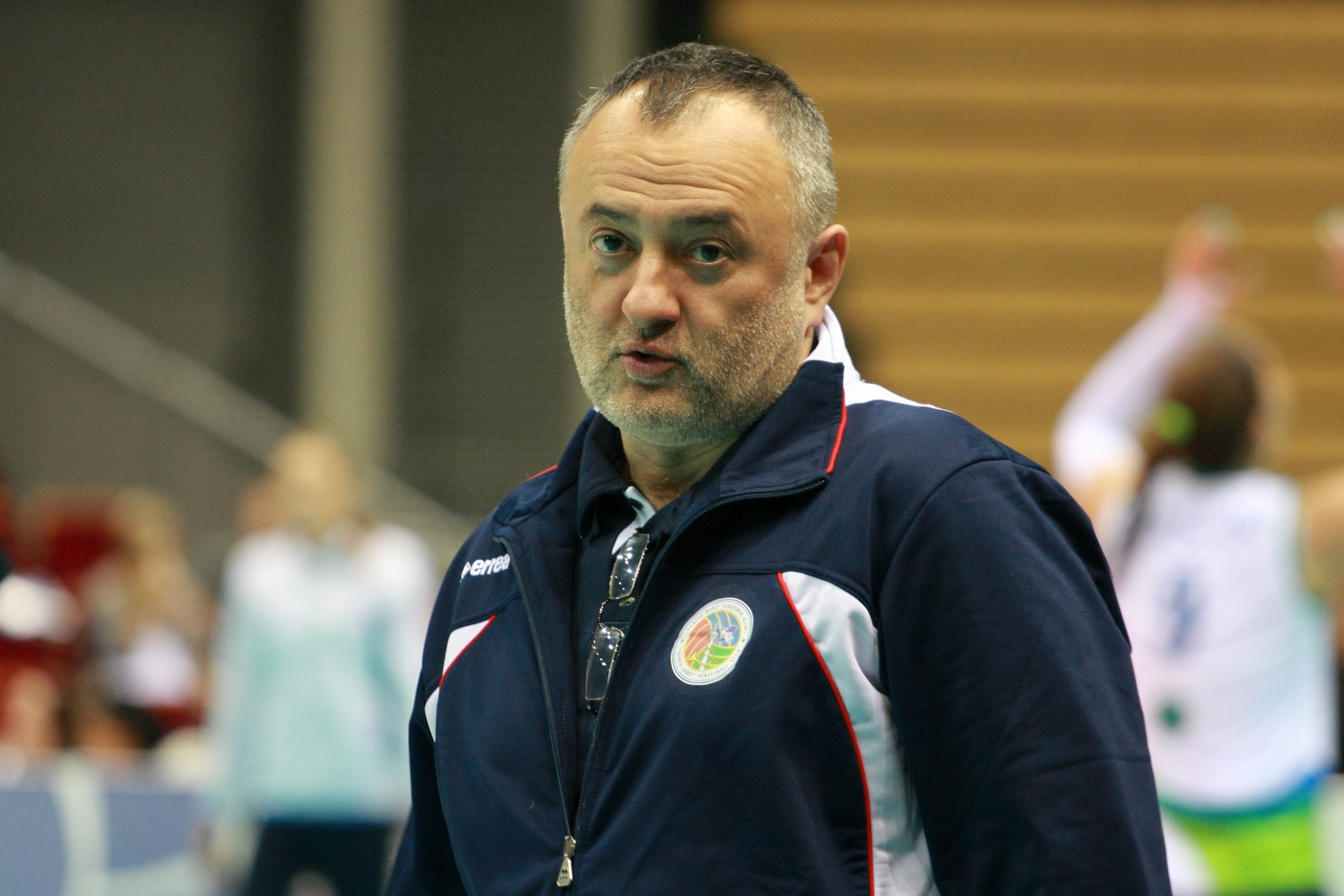 Atom Trefl Sopot vs Rabita Baku